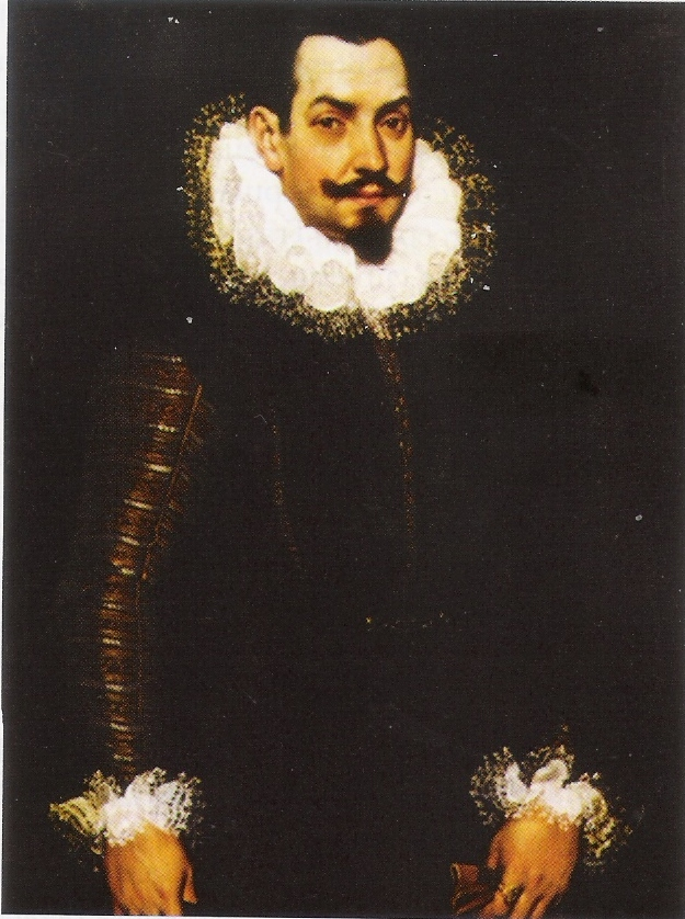 Cuadro del siglo XVI en el Museo de Bellas Artes de Bilbao del marino español Juan Pablo Carrión